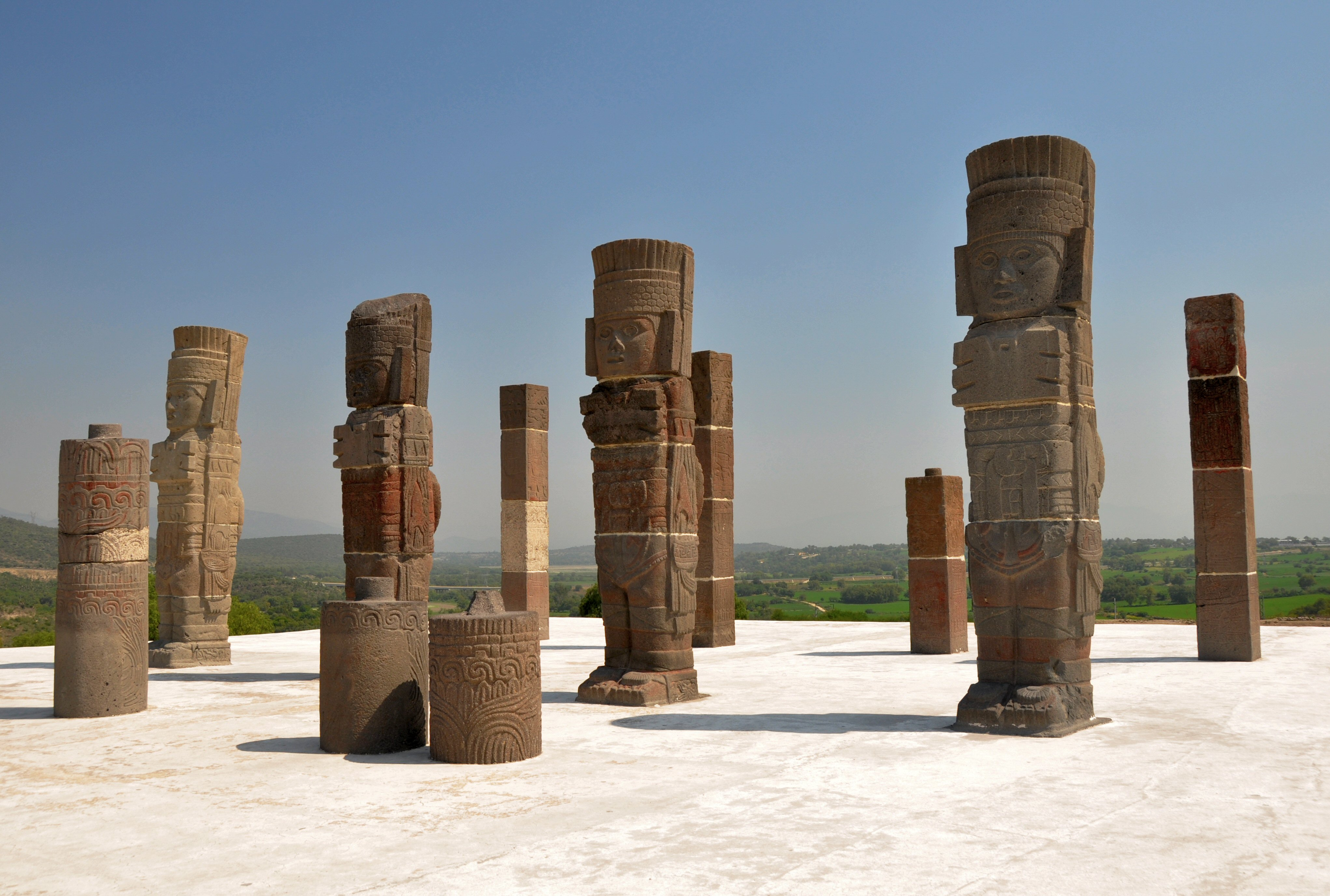 Tula de Allende, Mexico